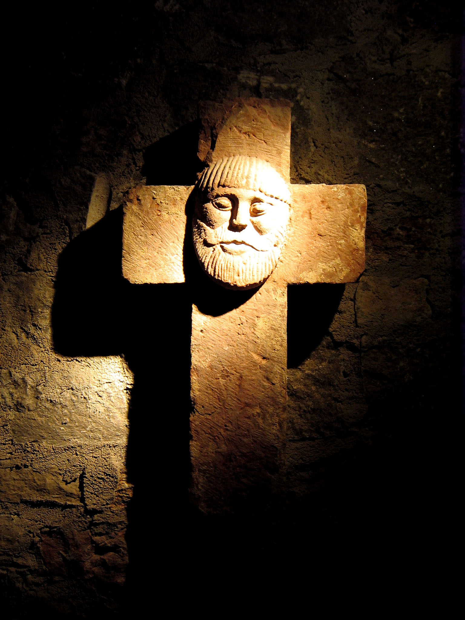 Merowingerkreuz in der Krypta des Würzburger Kiliansdoms